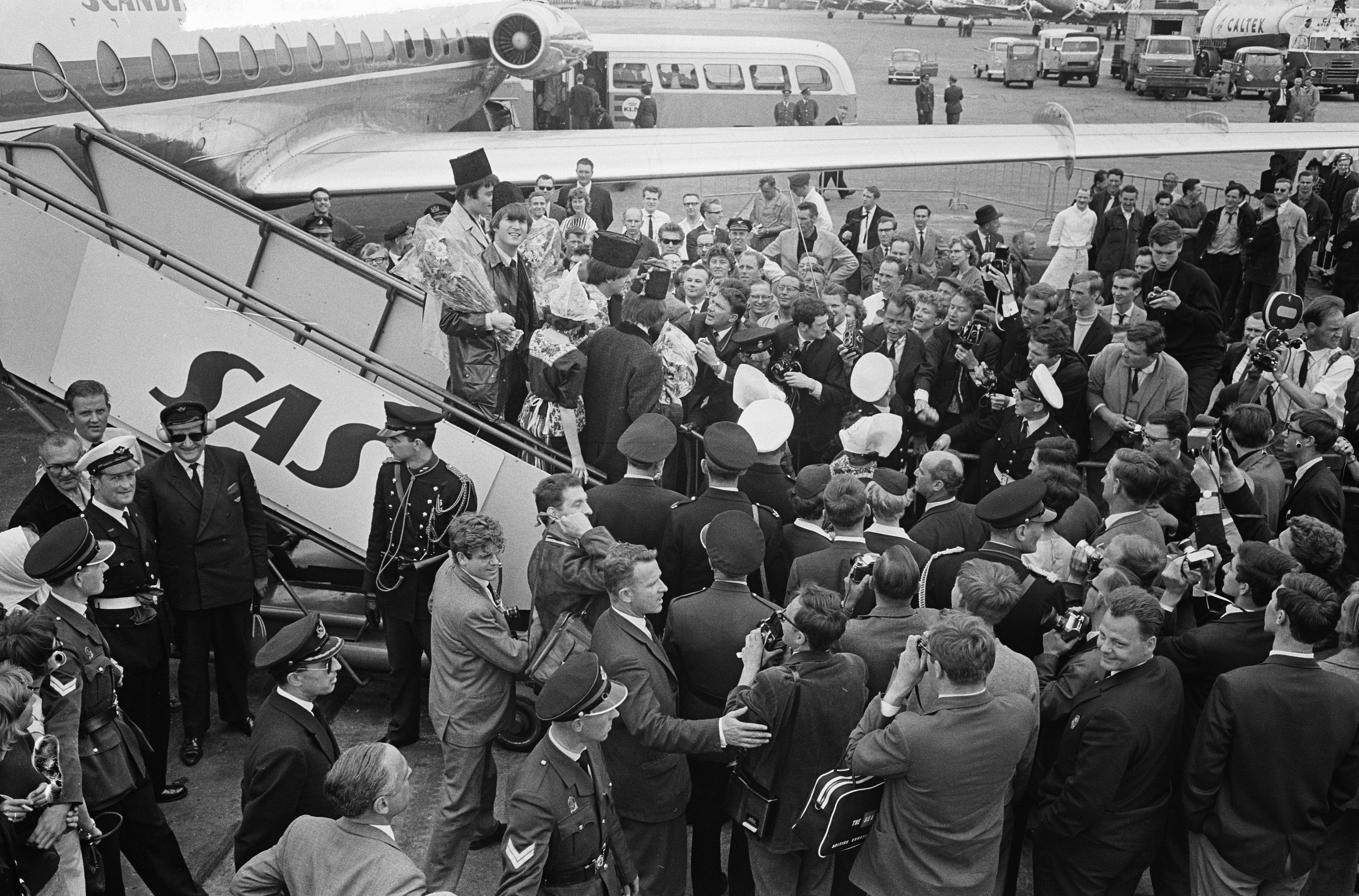 Collectie / Archief : Fotocollectie Anefo Reportage / Serie : [ onbekend ] Beschrijving : Aankomst Beatles op Schiphol, omringd door politiemensen gaan de Beatles naar de aankomsthal door een horde persmensen Datum : 5 juni 1964 Locatie : Noord-Holland, Schiphol Trefwoorden : pers, popgroepen, publiek, vliegvelden Instellingsnaam : Beatles Fotograaf : Pot, Harry / Anefo Auteursrechthebbende : Nationaal Archief Materiaalsoort : Negatief (zwart/wit) Nummer archiefinventaris : bekijk toegang 2.24.01.05 Bestanddeelnummer : 916-5127